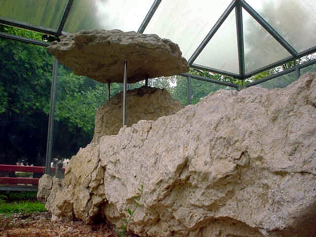 Dolmen - Laufen - Kanton Baselland - Schweiz